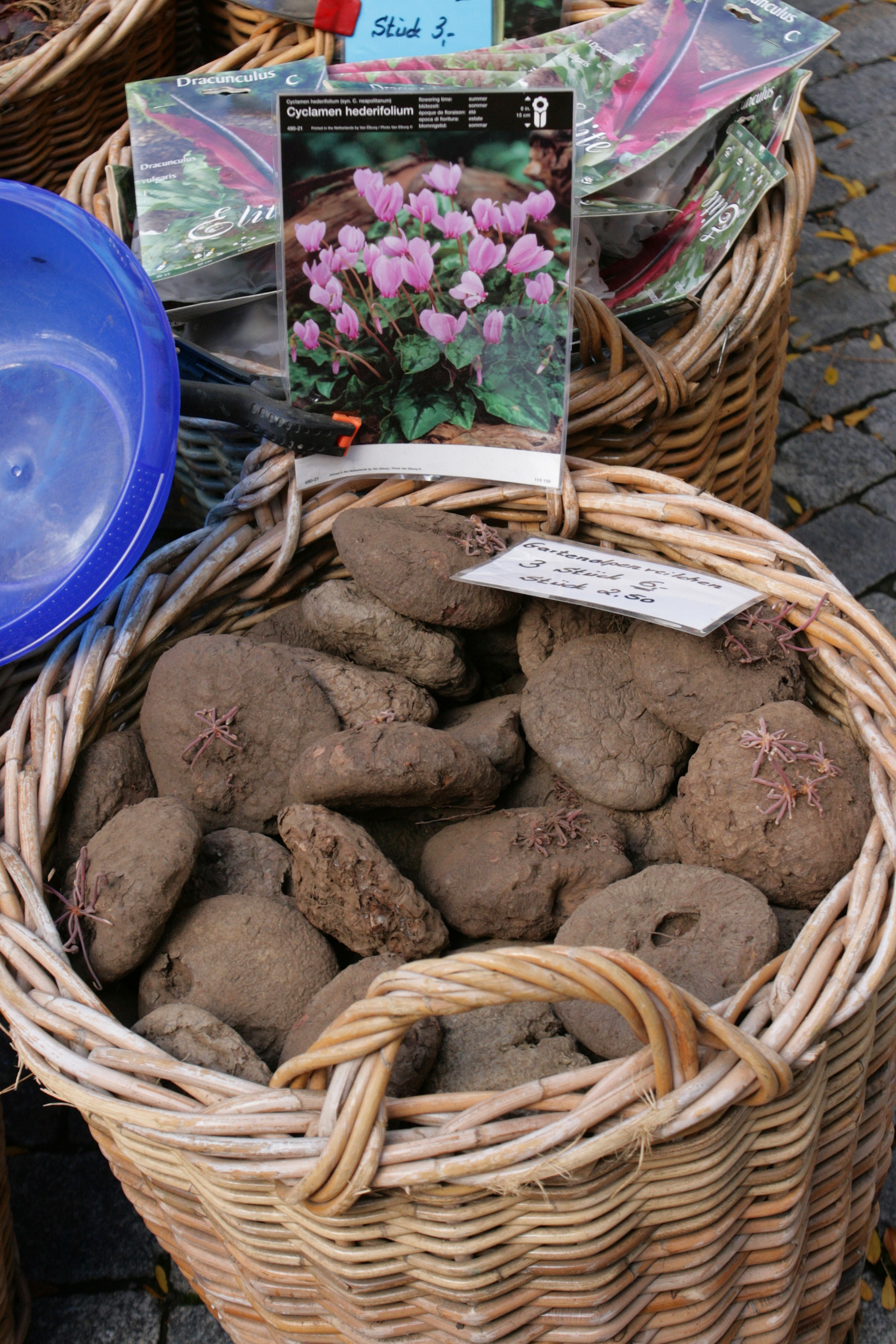 Bauernmarkt in Remscheid-Lüttringhausen: Knollen des Alpenveilchens Cyclamen hederifolium